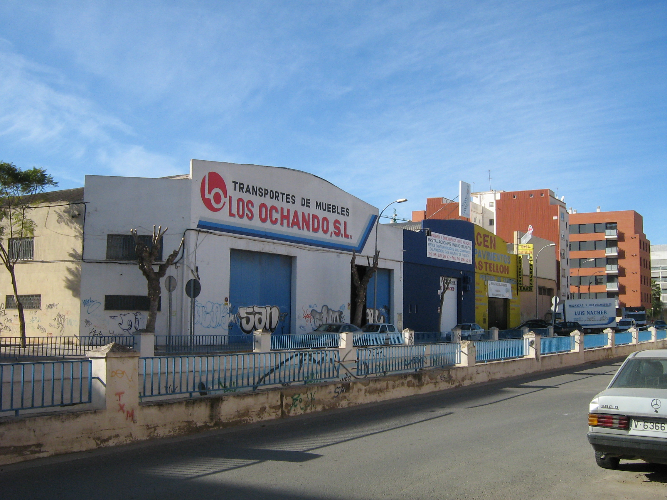 Poligono industrial de Benetusser